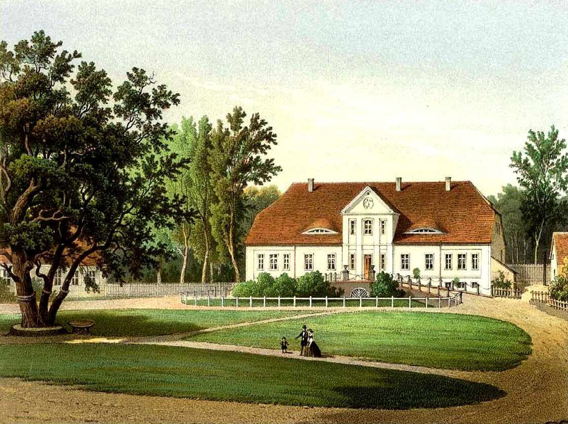 Gut Janow, Kreis Anclam